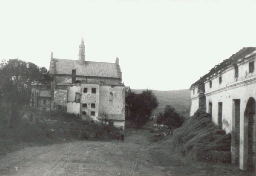 Spalone przez UPA miasto Bukowsko zdjęcia wykonane w roku 1946. Zdjęcie z Archiwum Muzeum Historycznego w Sanoku. Aftermath of the fire. Bukowsko. 1946